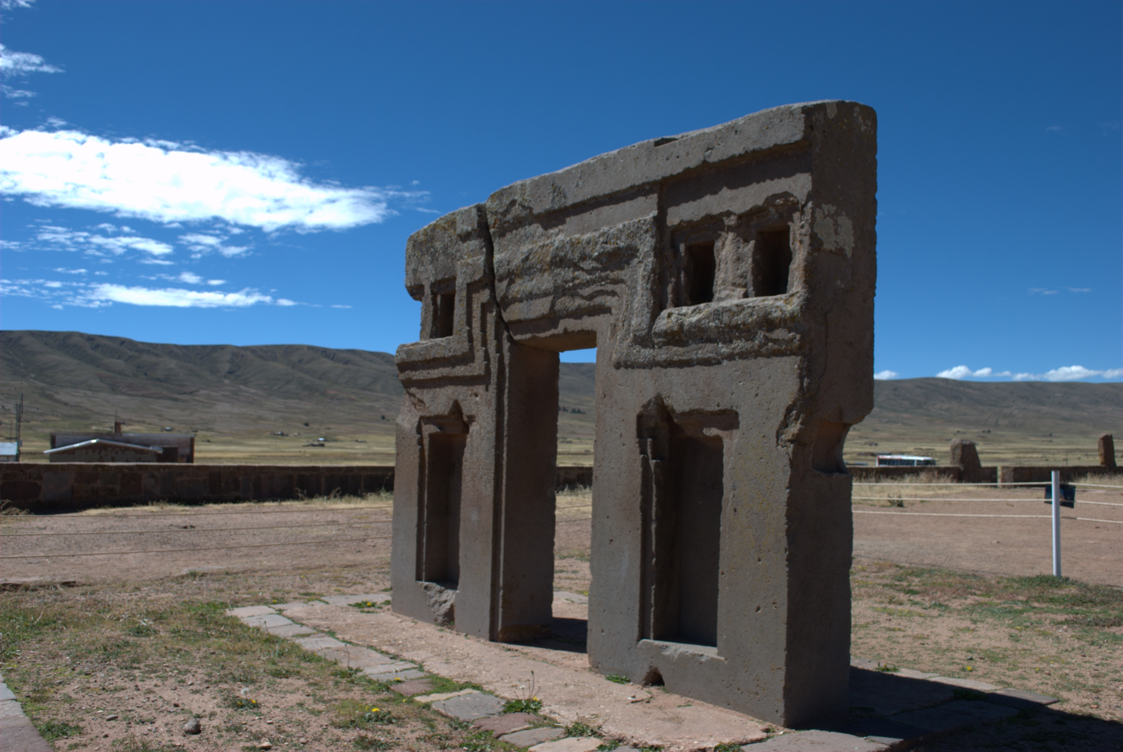 Vista Posterior de la Puerta del Sol.